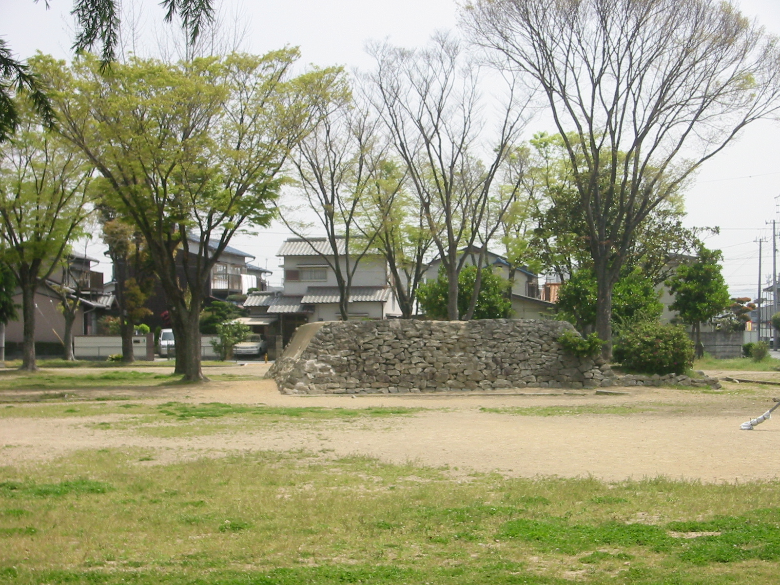 兵庫県英賀城跡